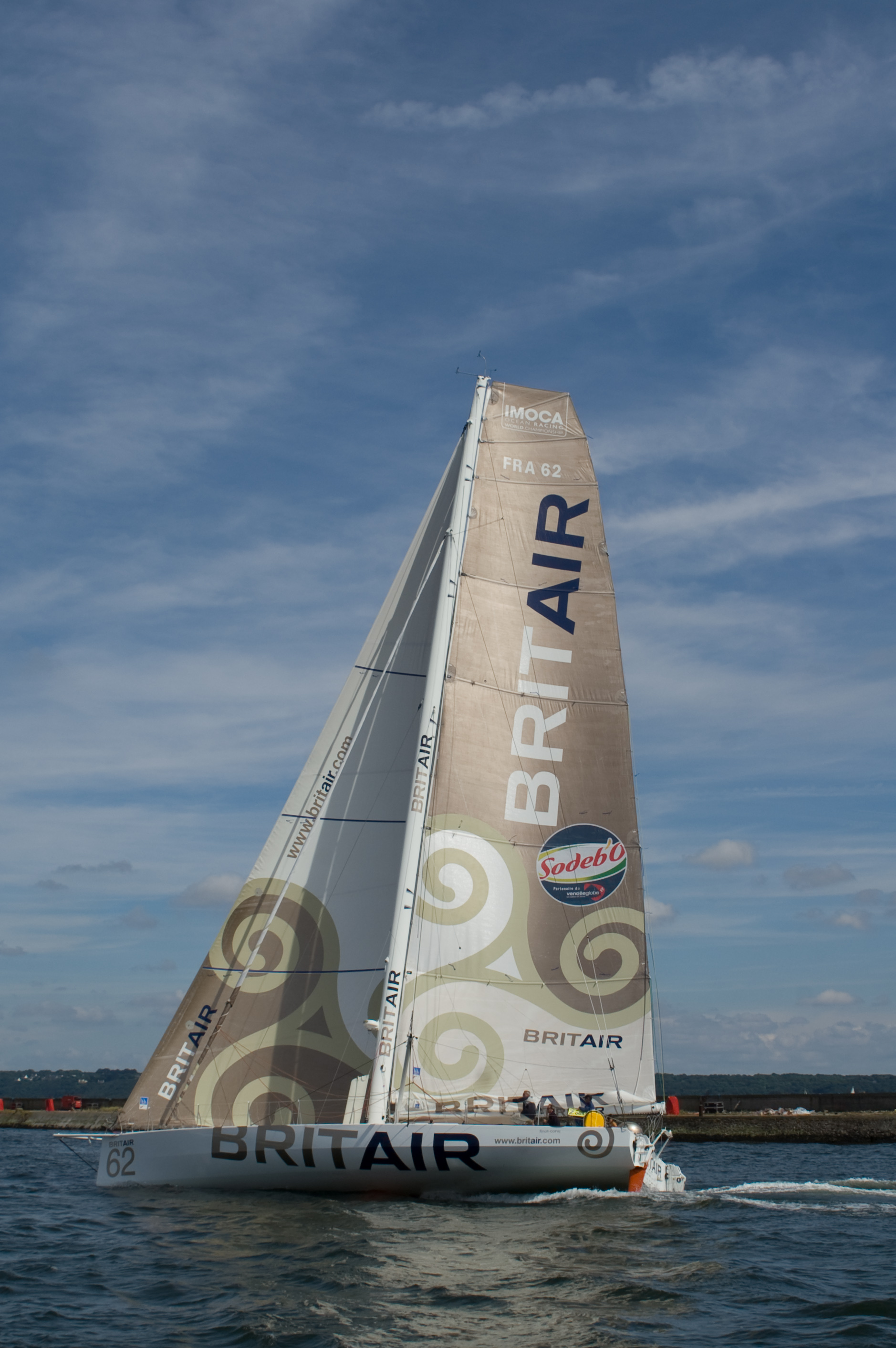 Britair, 60 pieds IMOCA